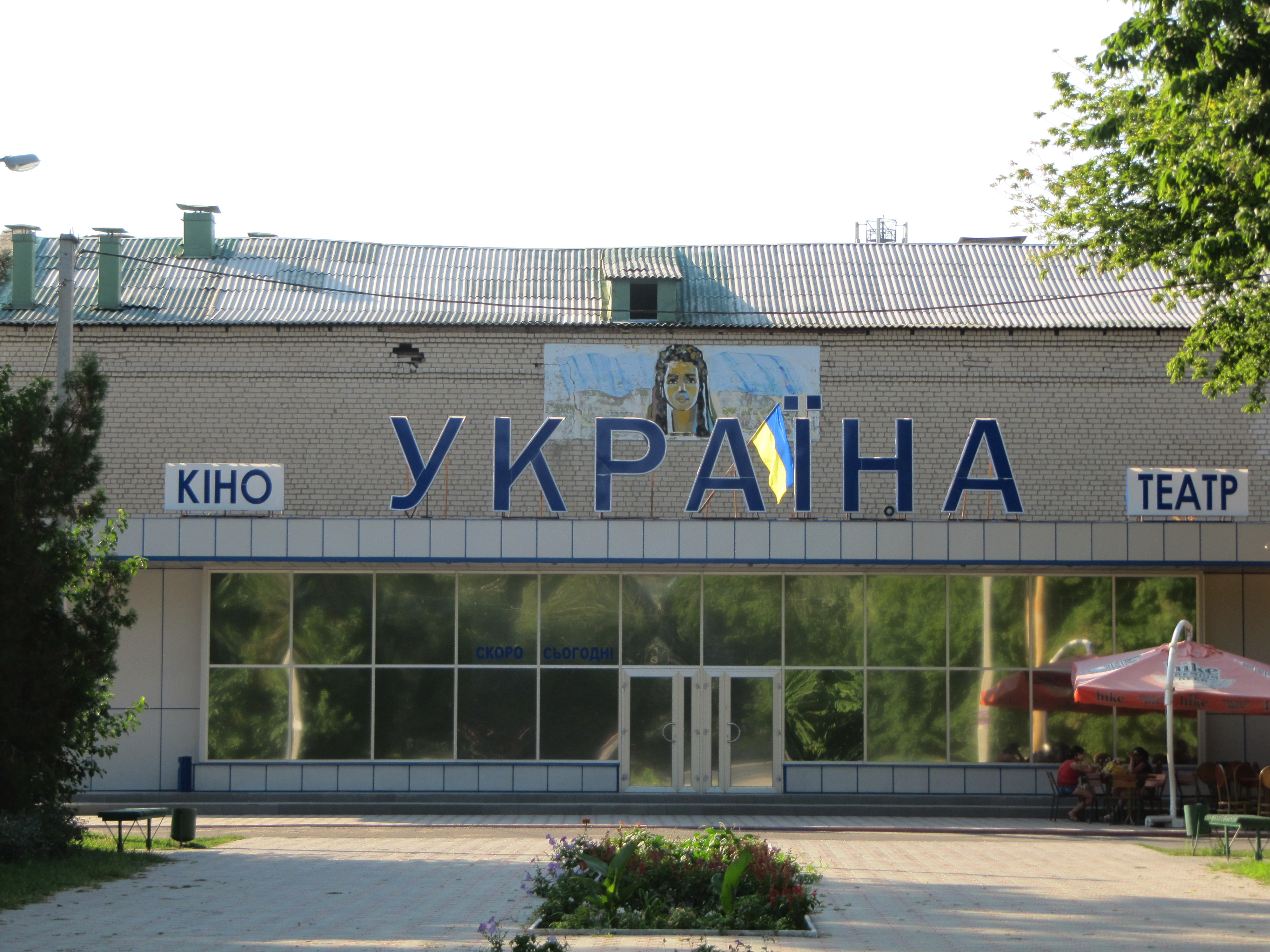 Вознесенськ, кінотеатр "Україна" Миколаївська весна у Вікіпедії